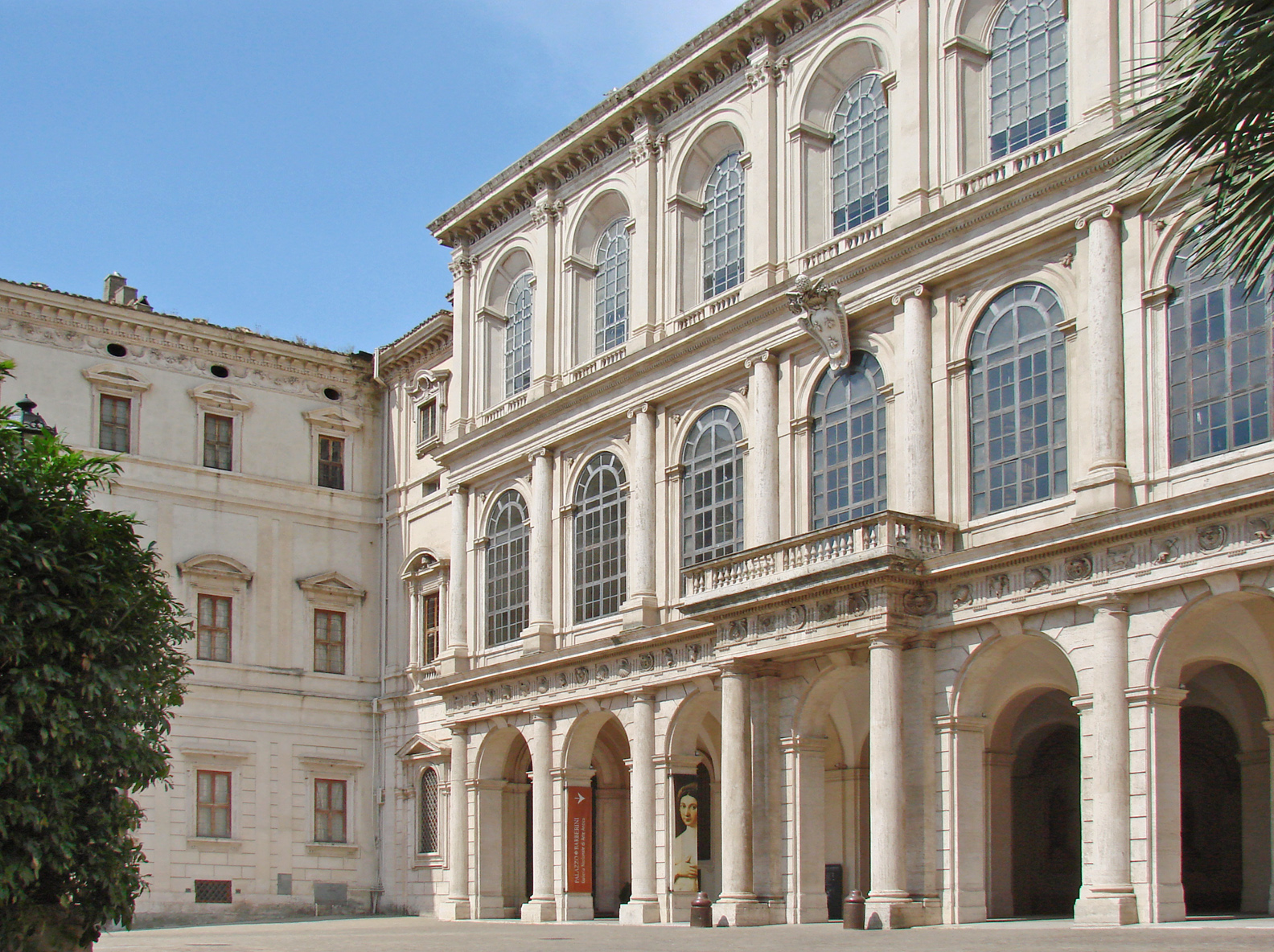 La façade centrale du palais Barberini et l'aile gauche Le palais a été conçu en 1625 par Carlo Maderno, à la demande du Cardinal Maffeo Barberini, devenu Pape en 1623 sous le nom d'Urbain VIII. La forme du bâtiment est celle d'une vaste villa avec deux ailes en H qui s'avancent dans des jardins. A la mort de l'architecte, Le Bernin reprend les travaux en collaboration avec Francesco Borromini. Les colonnes de la façade (Le Bernin) sont des trois ordres, dorique au rez-de-chaussée, ionien au premier étage, corinthien au deuxième étage, en pilastres. Le portique au rez-de-chaussée permet d'alléger l'allure du bâtiment. Les salles du premier étage ont toutes des plafonds peints dont celui du salon principal, oeuvre exceptionnelle pour sa taille et sa composition de Pierre de Cortone (Le Triomphe de la Divine Providence). Le palais accueille aujourd'hui la galerie nationale d'art ancien (Galleria nazionale d'arte antica) qui comprend des oeuvres très célèbres comme "La Fornarina" de Raphaël. Site officiel de la Galerie du palais Barberini